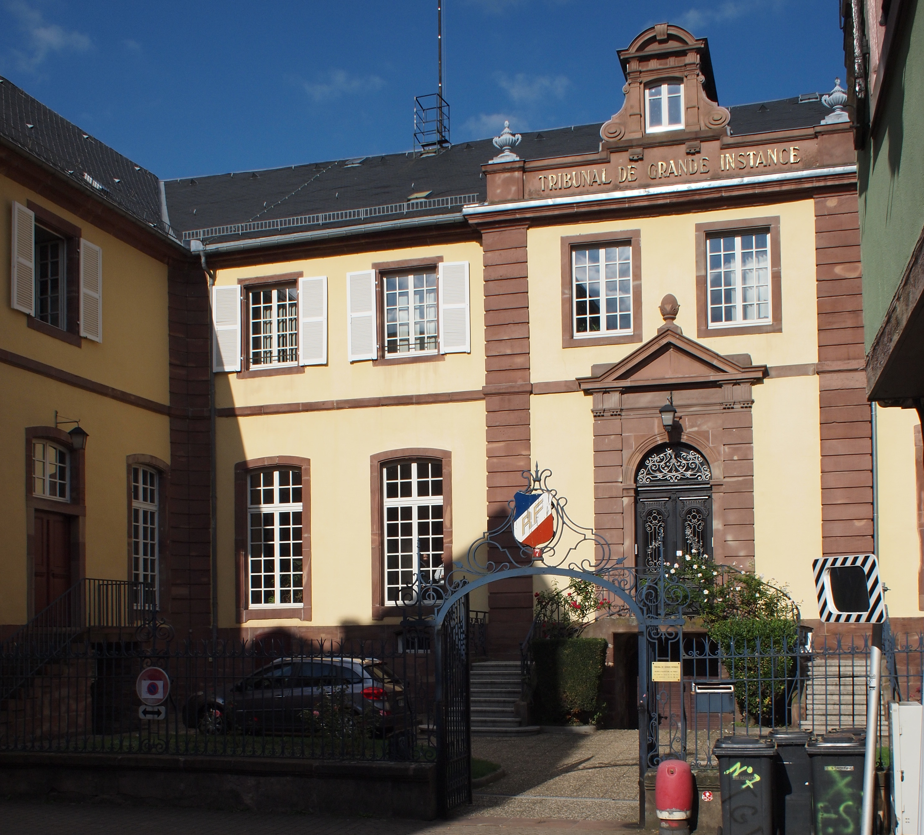 Saverne, Tribunal de Grand Instance